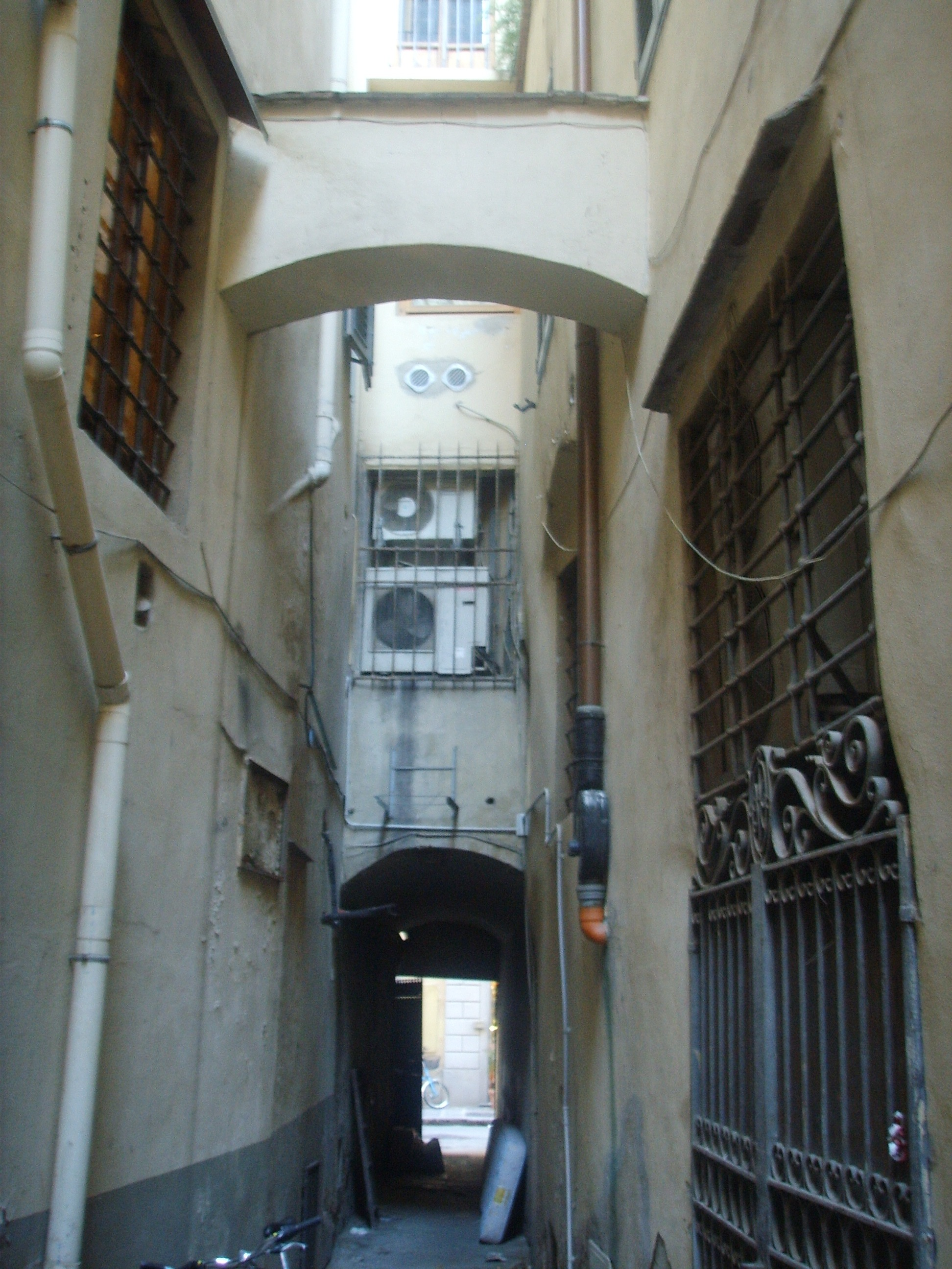 Vicolo_del Bazar in Florence, italy